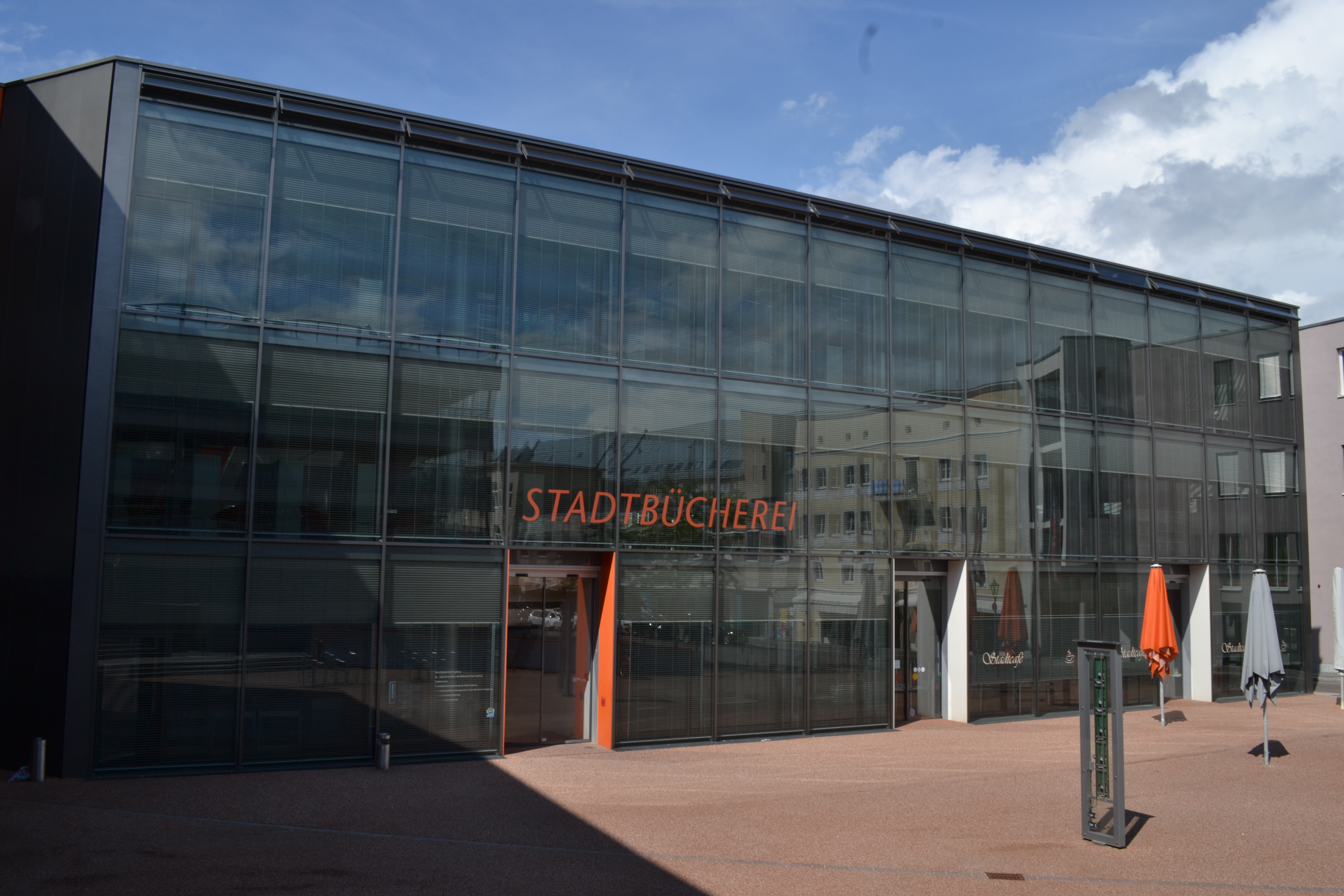 Die Stadtbücherei Augsburg mit Vorplatz.